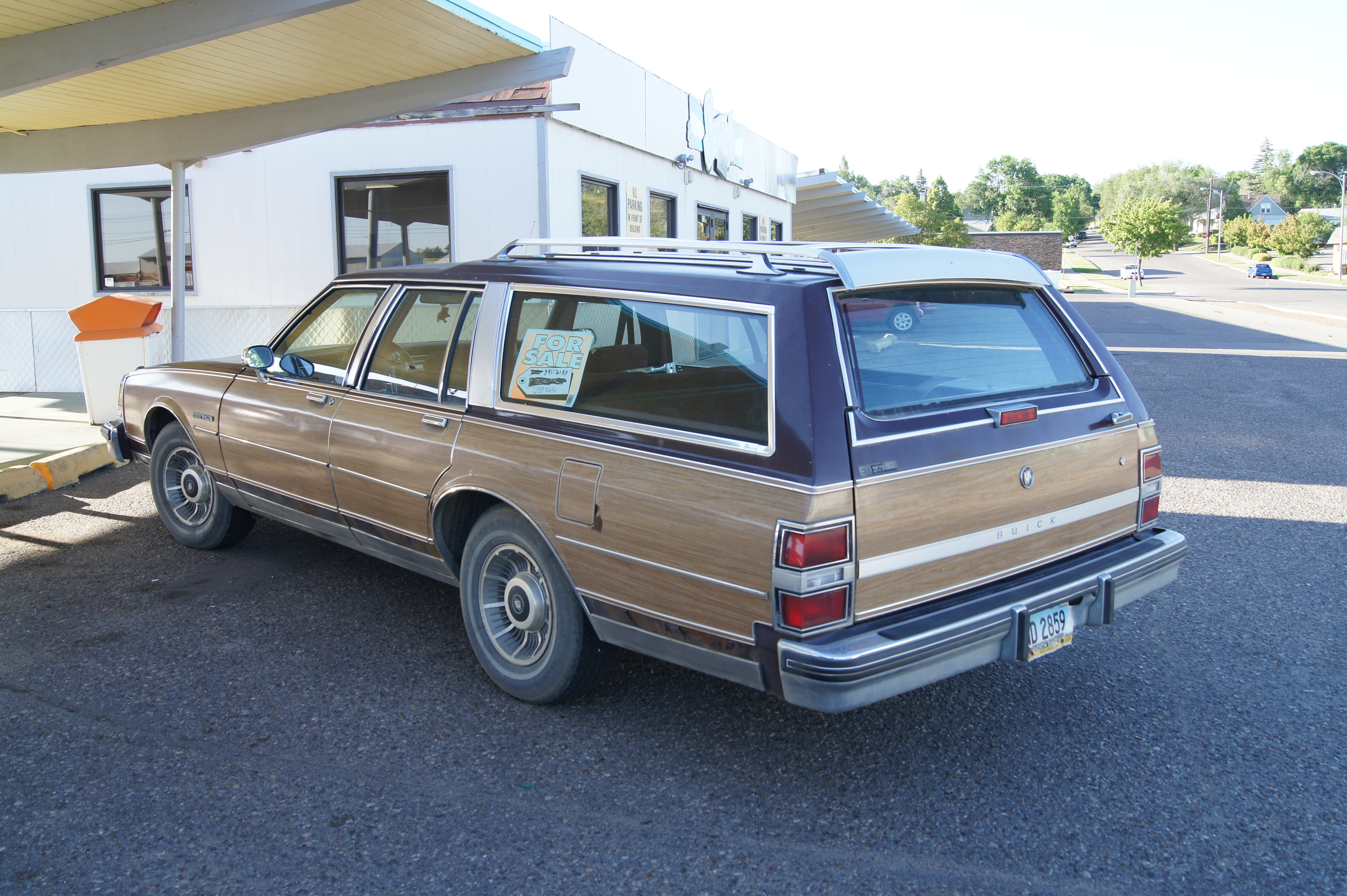 90 Buick Estate